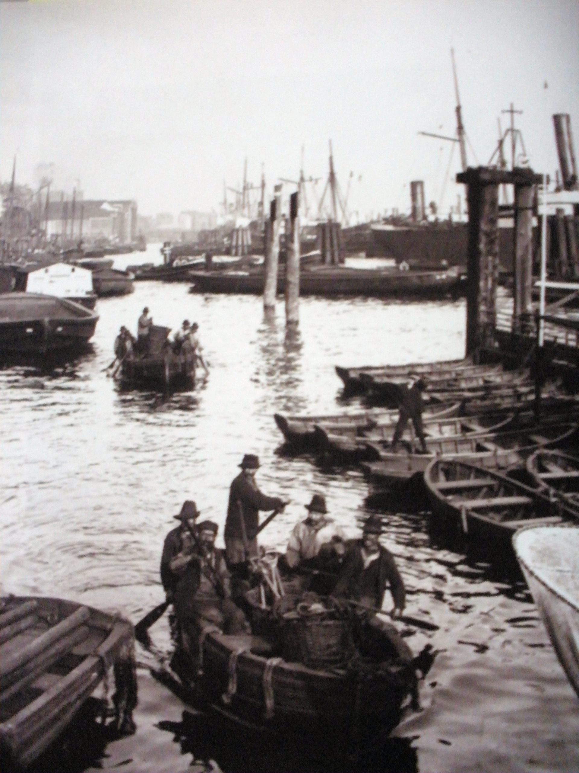 Hafenarbeiter - Kohlenleute (Schwarze Scheuerleute) auf der Rückkehr aus dem Hafen, Roosenbrücke beim Vorsetzen